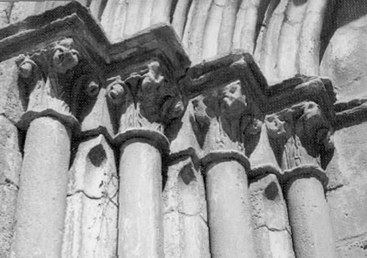 Santa Cecilia. Capiteles 1971 - Aguilar de Campoo (Palencia) - Fotografía. Papel 750 x 105 mm B/N